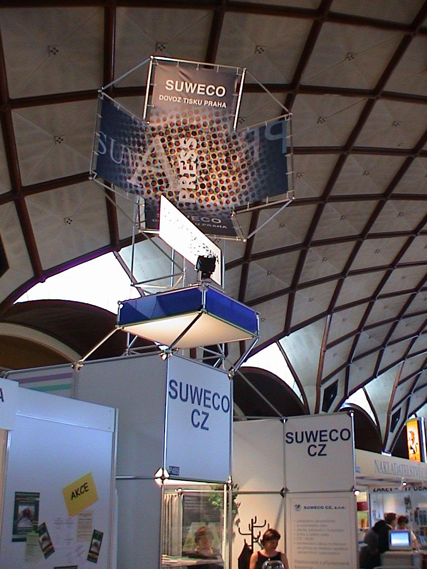 Svět knihy v Praze